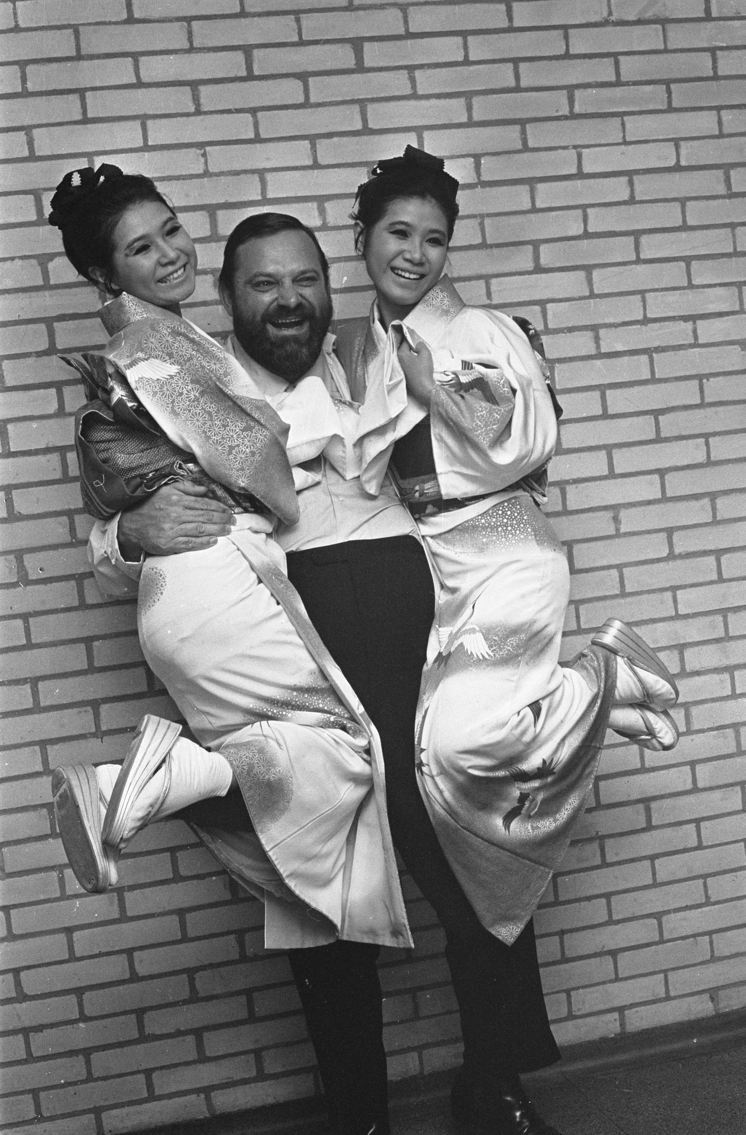 Collectie / Archief : Fotocollectie Anefo Reportage / Serie : Grand Gala du Disque in het concertgebouw te Amsterdam Beschrijving : Amerikaanse trompetist Al Hirt met het Japanse zangduo The Peanuts Datum : 2 oktober 1966 Locatie : Amsterdam, Noord-Holland Trefwoorden : musici, muziek, tweelingen, zangeressen Persoonsnaam : Hirt, Al Fotograaf : Fotograaf Onbekend / Anefo Auteursrechthebbende : Nationaal Archief Materiaalsoort : Negatief (zwart/wit) Nummer archiefinventaris : bekijk toegang 2.24.01.05 Bestanddeelnummer : 919-6264 Reacties Geplaatst door Geschiedenismens - Muziek op 26 november 2017 - 21:51. Grand Gala du Disque Populaire in het RAI congrescentrum Datum: 01 oktober 1966 (locatie Concertgebouw is onjuist en datum 2 oktober is onjuist) NB. Mogelijk is deze foto na afloop gemaakt tijdens het Platenbal, dat na 24.00 uur begon en het toen inmiddels wel 02 oktober was.